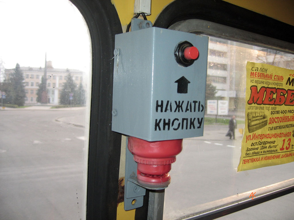 Гомельский компостер